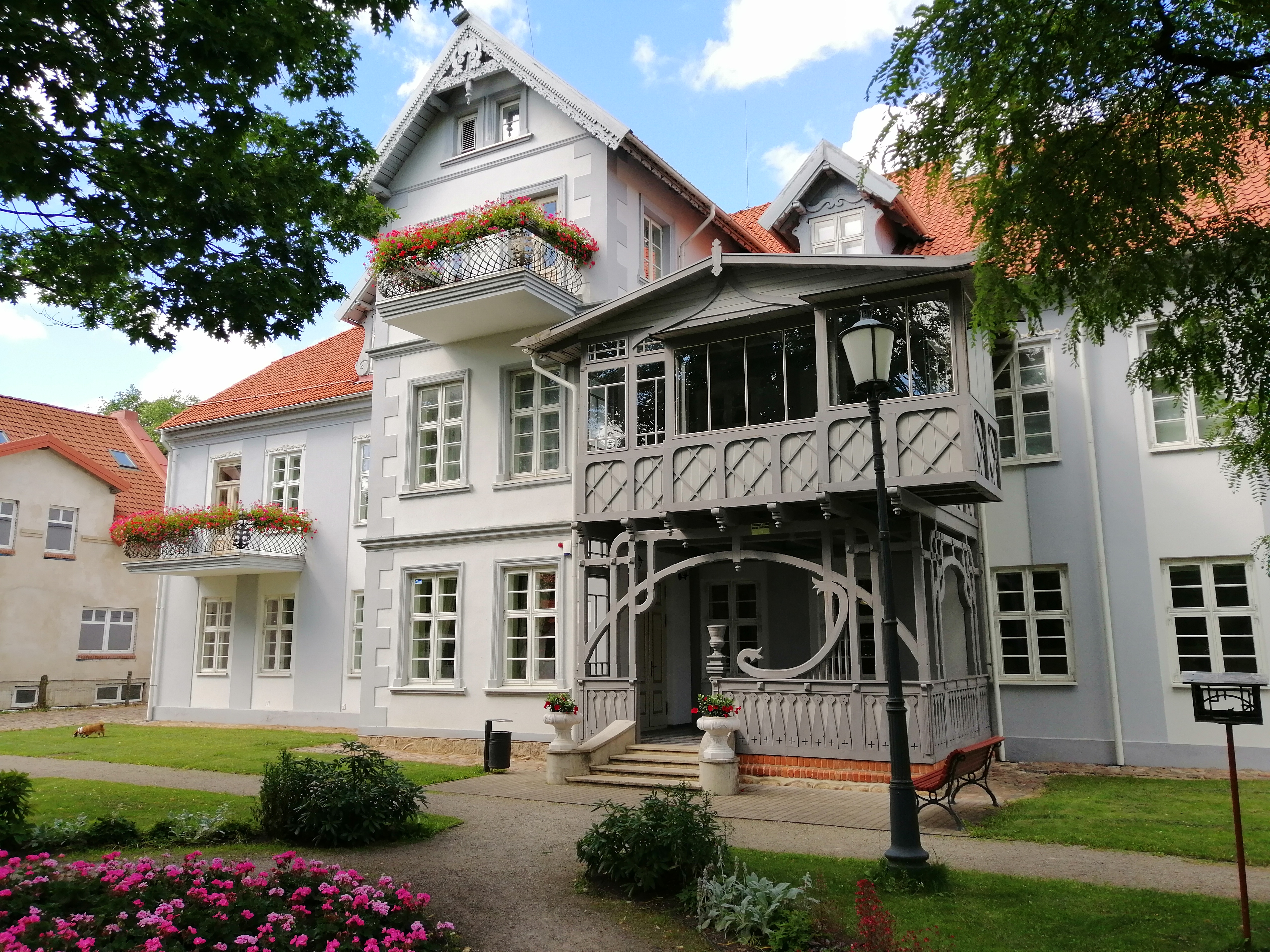 Hugo Šojaus dvaras